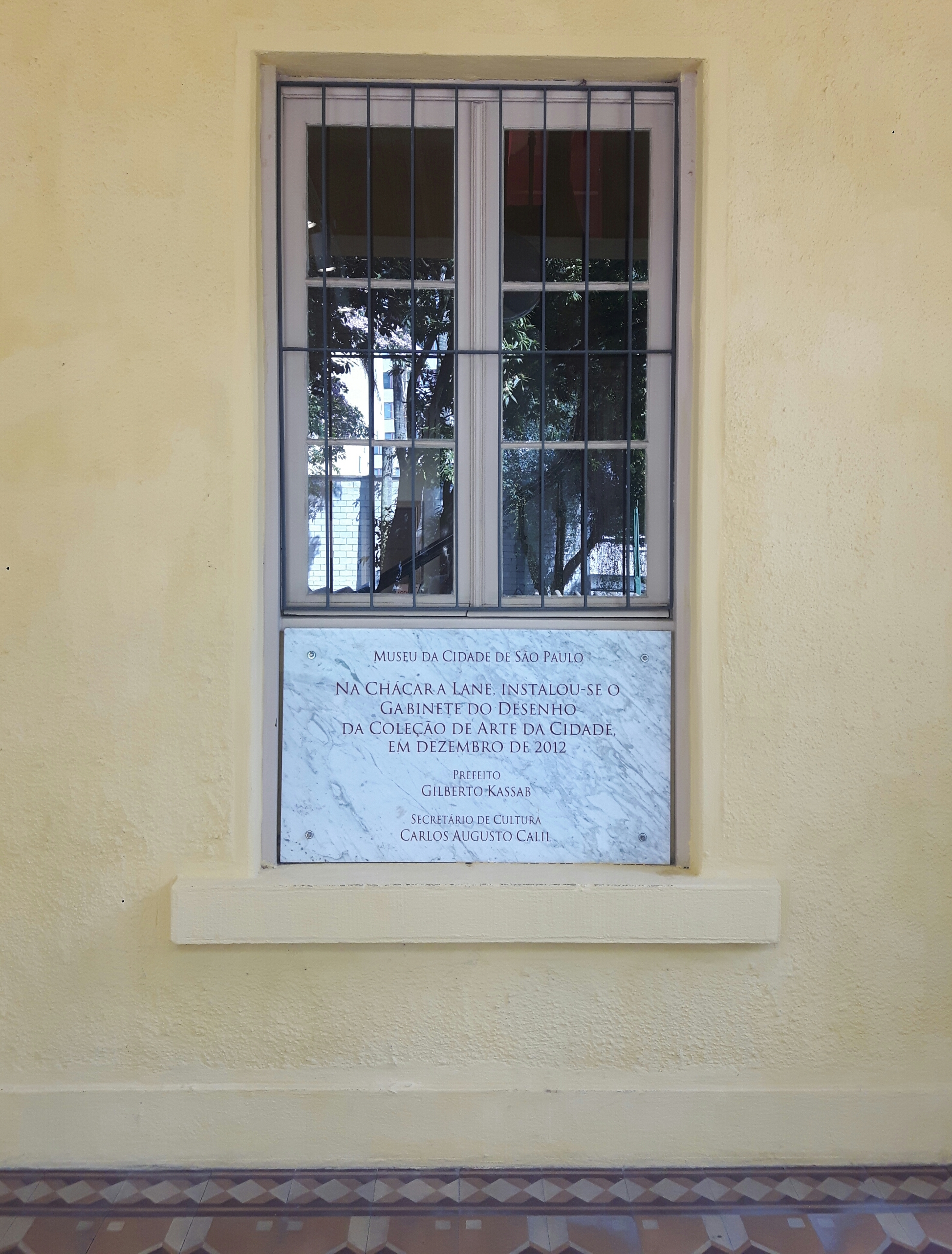 Placa informando que a Chácara Lane é um Museu da Cidade de São Paulo, em uma janela na entrada do edifício